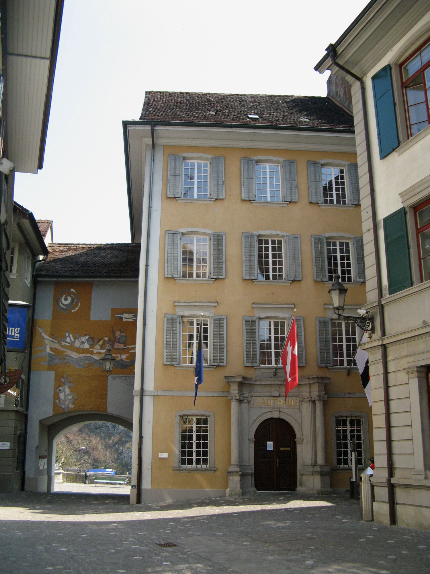 Stadthaus, Teil des Rathauskomplexes in Baden